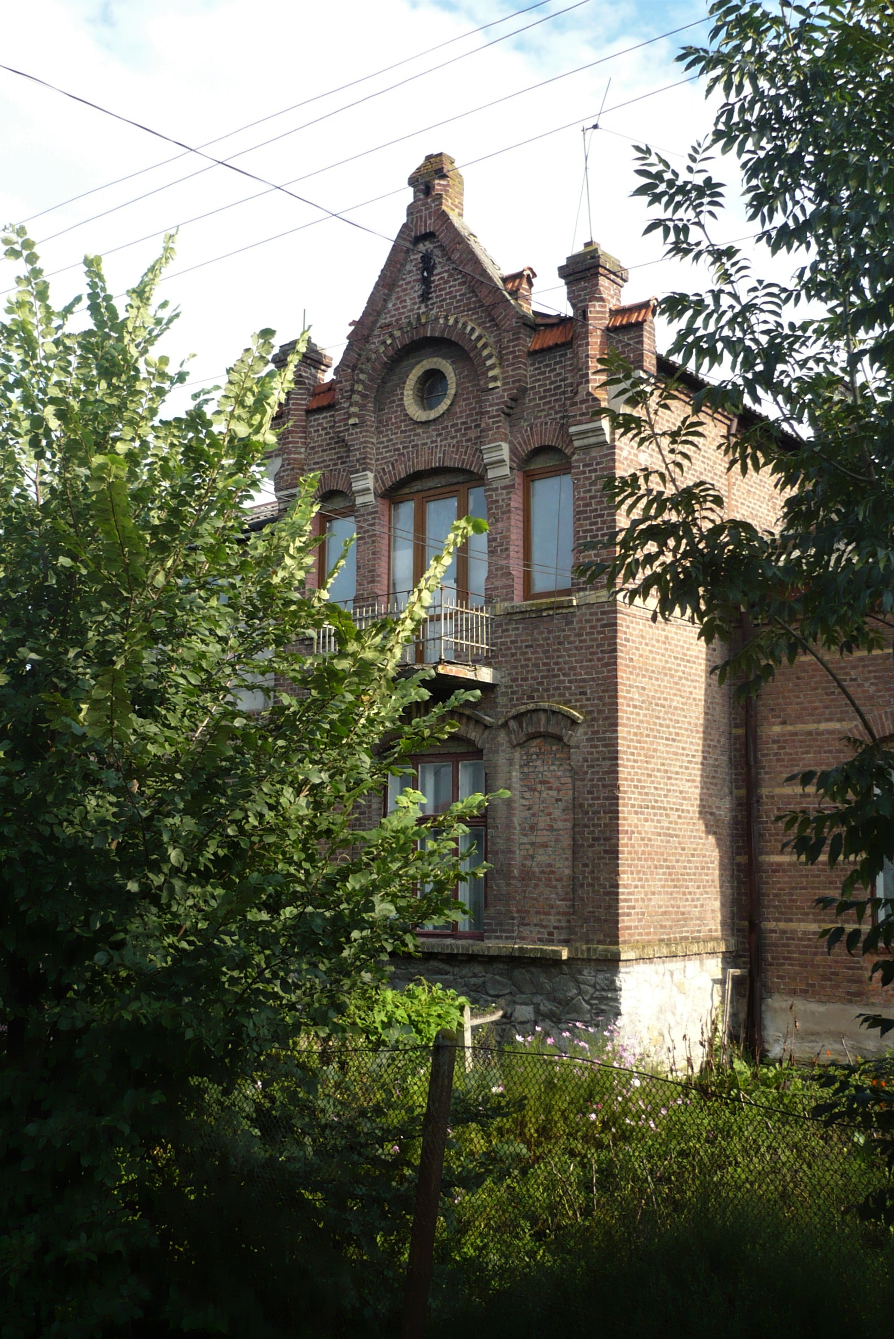 Kamienica w Złoczowie